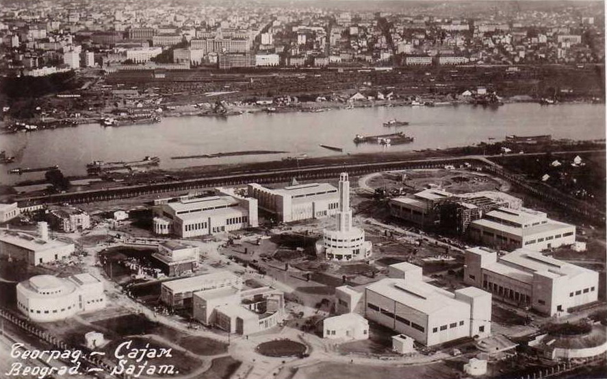 Београдски сајам је изграђен на основу одлуке Београдске општине 1936. године. Друштву за приређивање сајма и изложби је уступљен терен крај новоизграђеног Моста краља Александра. Прва фаза радова је започета у пролеће 1937. године, а завршена је до отварања, септембра 1937. Друга фаза, у којој су изграђени Турски и велики Немачки павиљон, завршена је 1938. Планирана је изградња и шестог југословенског павиљона, али су радови обустављени због избијања Другог светског рата. За време Другог светског рата га је Гестапо користио као концентрациони логор у ком је страдало око 48.000 људи.